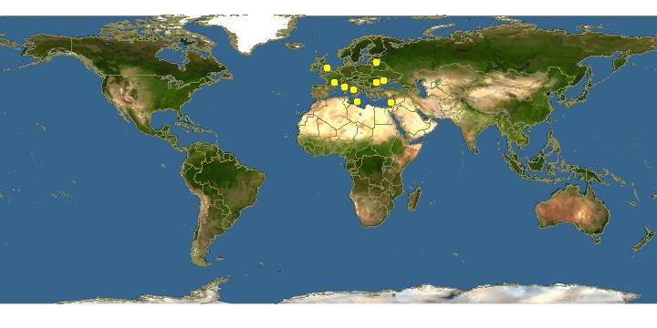 Ареал азовського пузанка